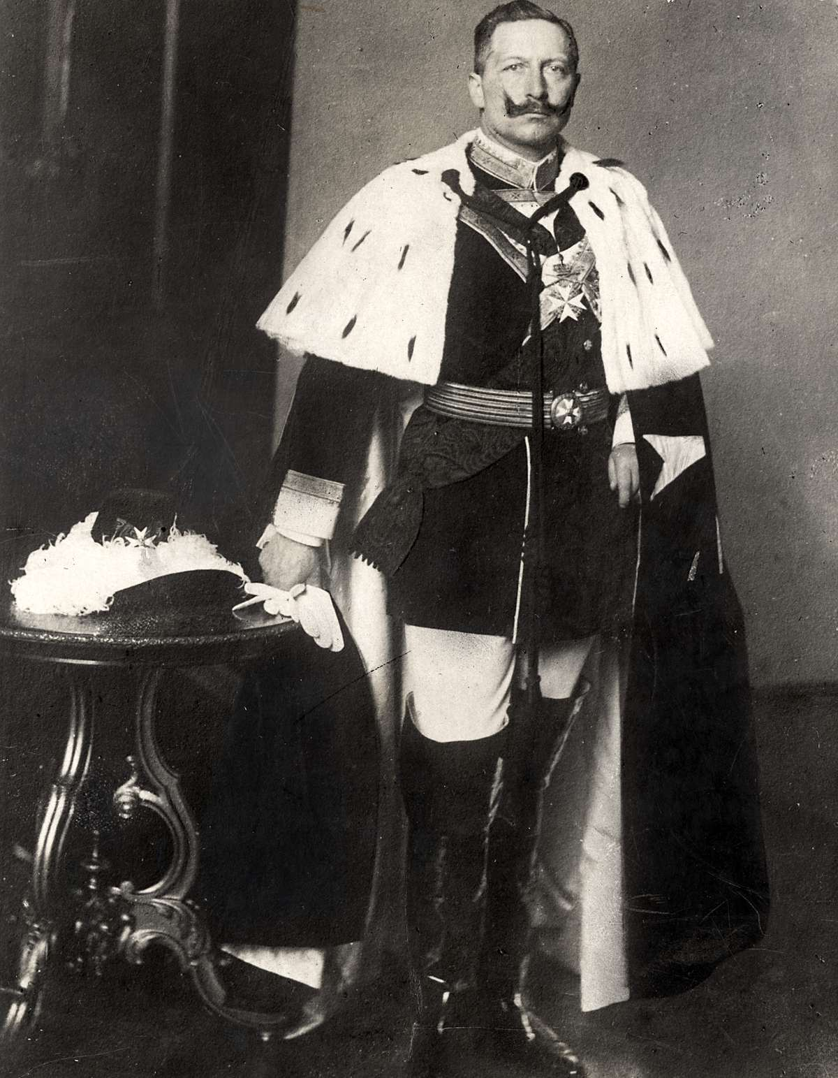 Kaiser Wilhelm in der Robe der Großmeister des Johanniterordens